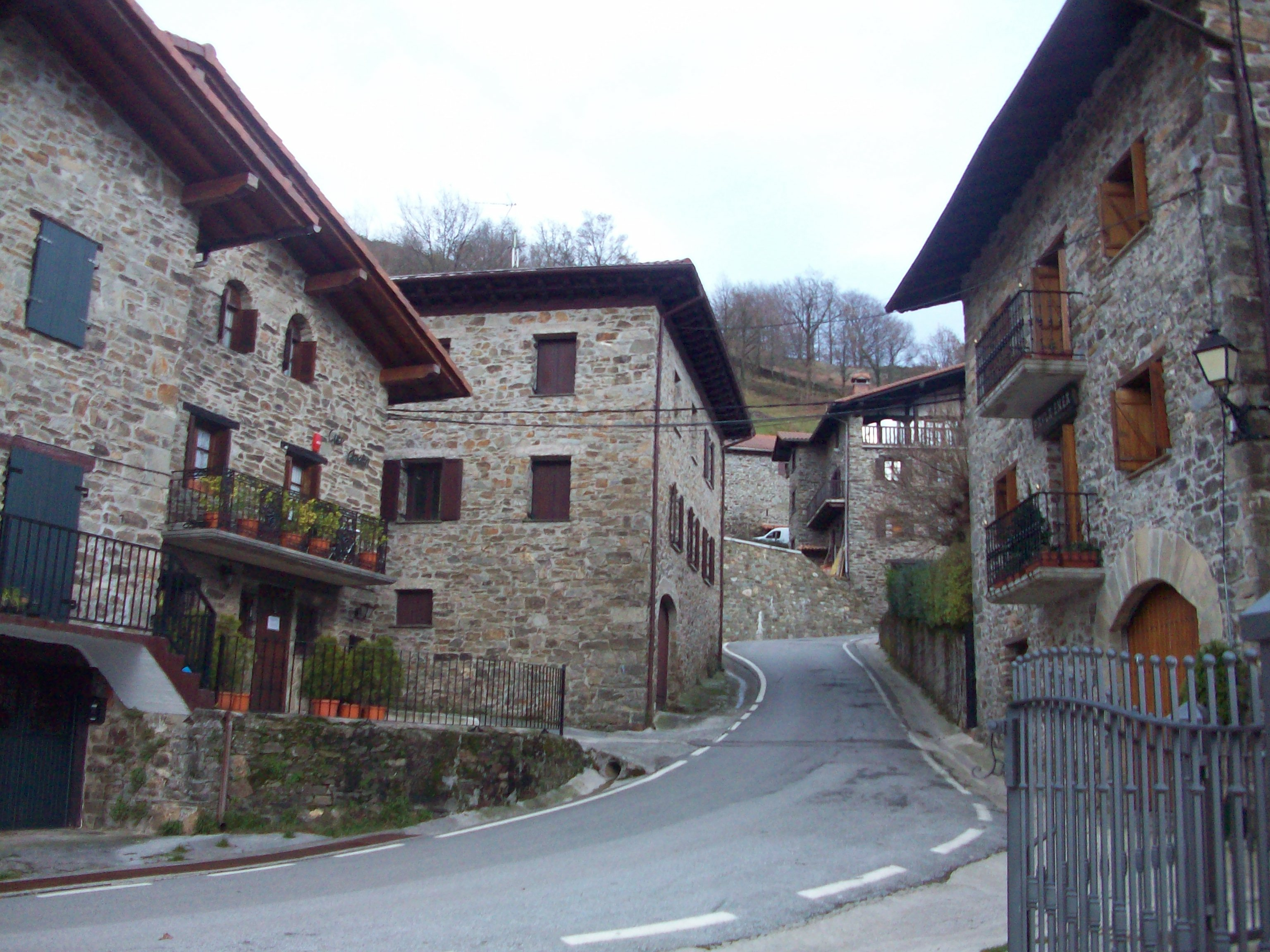 Aranoko etxeak. Nafarroa, Euskal Herria.